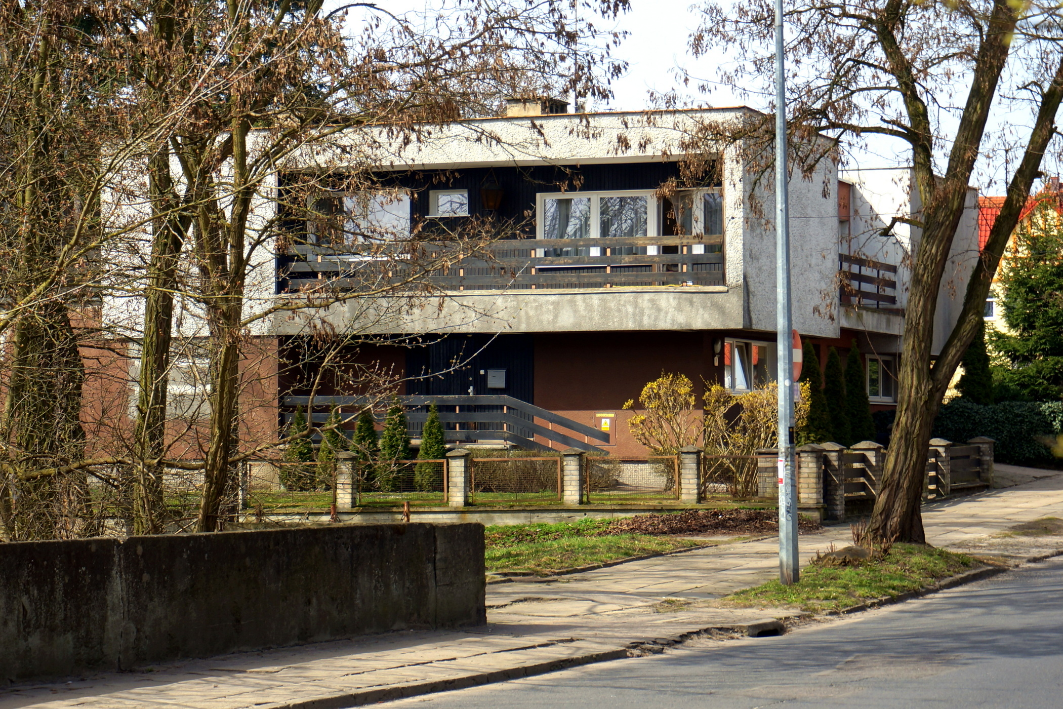 Gorzów Wlkp., ul. Chodkiewicza. Sytuowany nad rzeką Kłodawką, modernistyczny dom jednorodzinny w zabudowie bliźniaczej (realizacja 1973-1975). Widok na część której właścicielem był wybitny żużlowiec Stali Gorzów, Edward Jancarz.